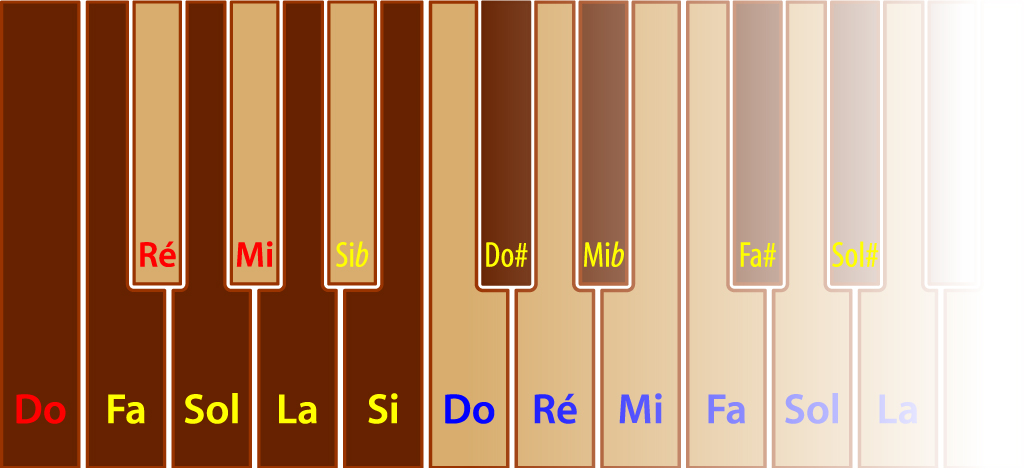 Schéma de principe de l'octave courte des orgues italiennes